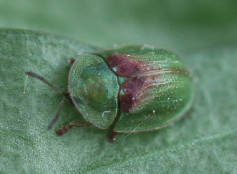 Schildkäfer Cassida cf. sanguinolenta am 24. April 2019 nahe Heidelberg